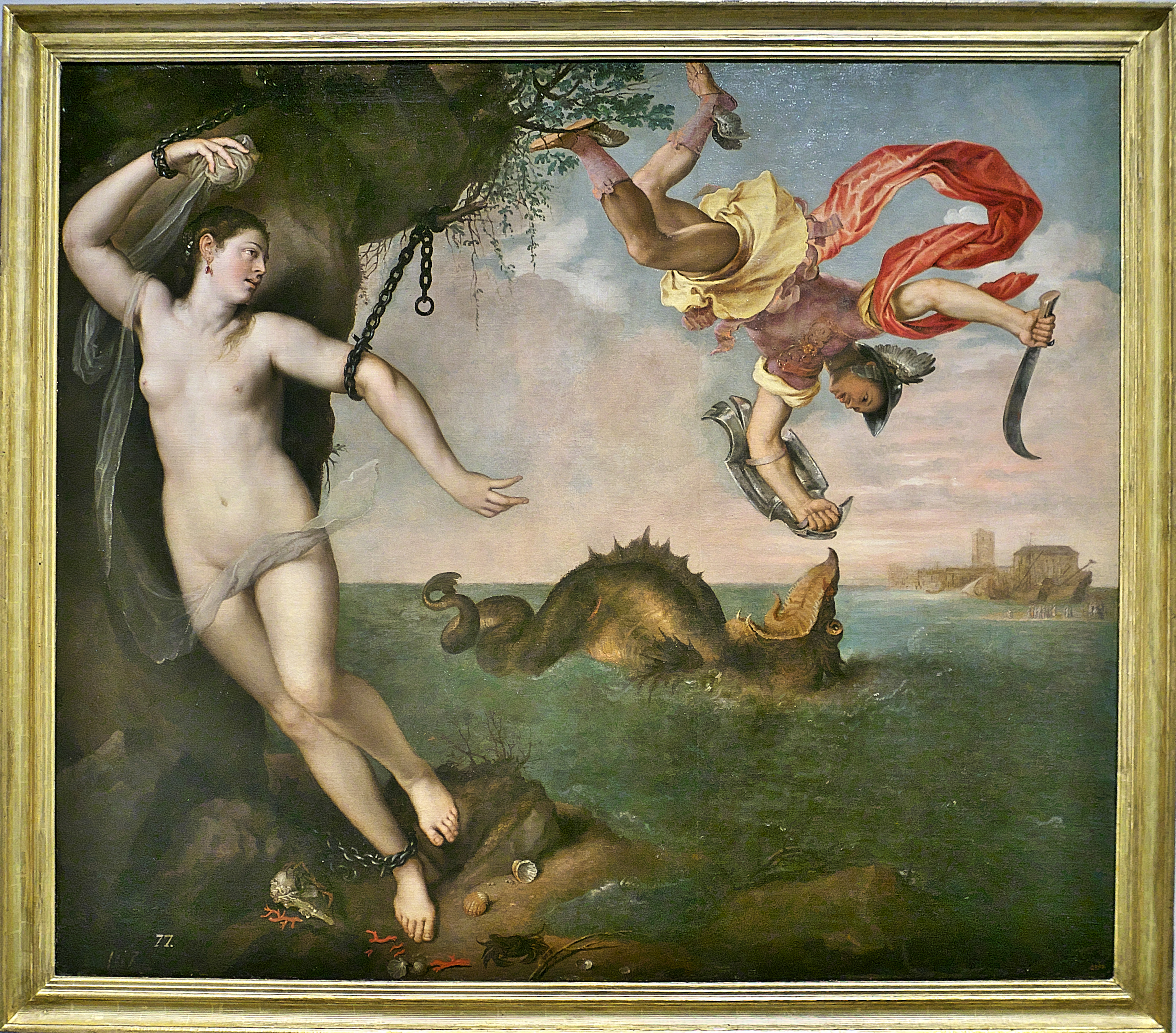 Museo del Prado. Anónimo (s. XVI), es copia de pintura de Tiziano (ca 1554-1556) existente en Colección Wallace. El original fue contratado por Felipe II (1553-1562), componente de un grupo de pinturas mitológicas conocido como poesías. Perseo y Andrómeda (Tiziano)